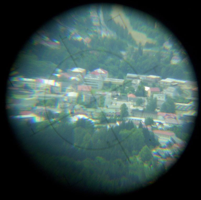 Jeseník dalekohledem